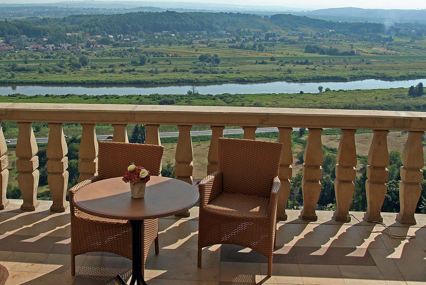 Z tarasu rozpościera się widok na Wisłę, południową część Krakowa i Beskidy.